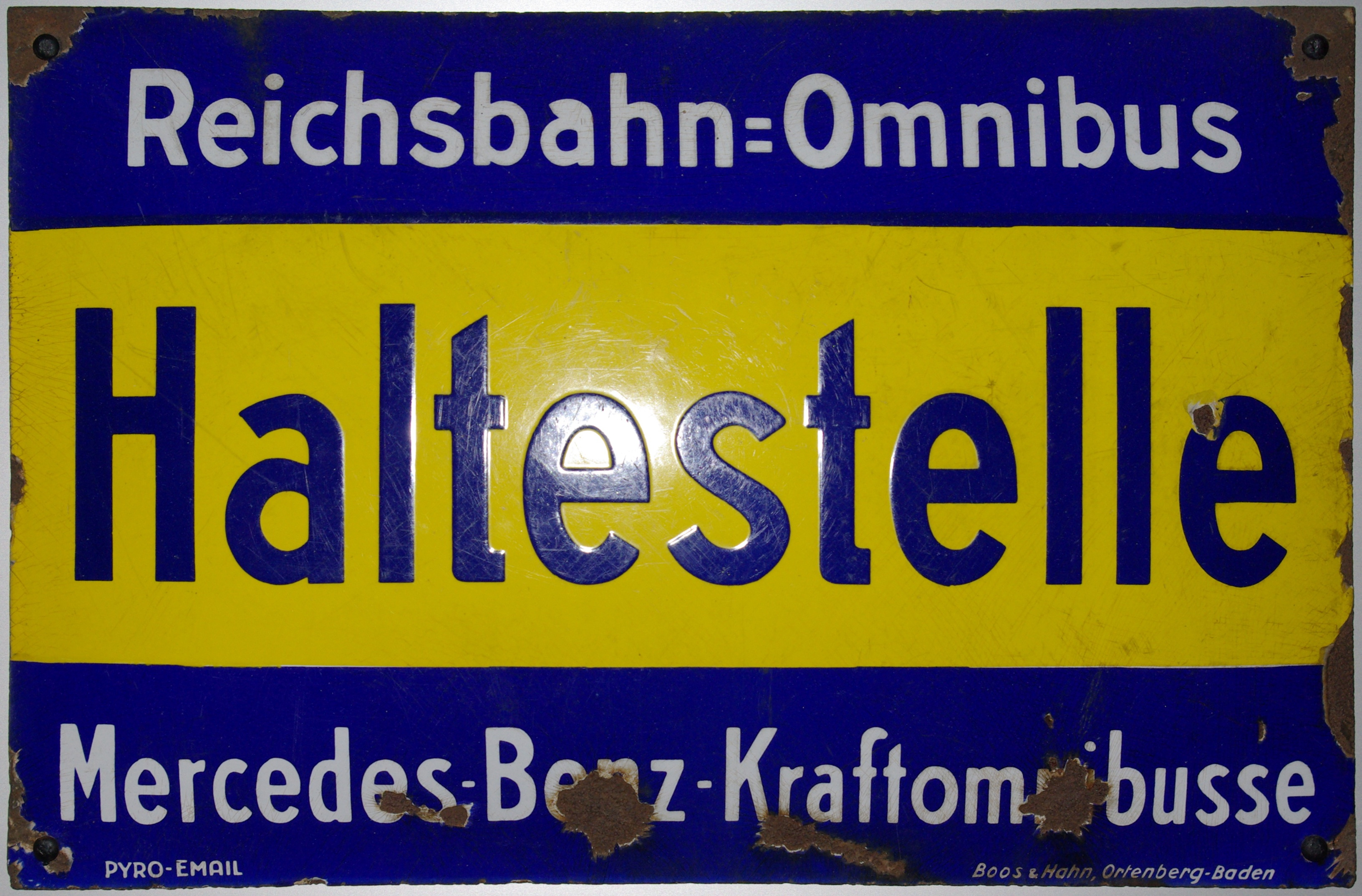 DB Museum Nürnberg - Reichsbahn=Omnibus Haltestelleschild um 1924 mit Mercedes-Benz-Werbung (Emaille-Schild).